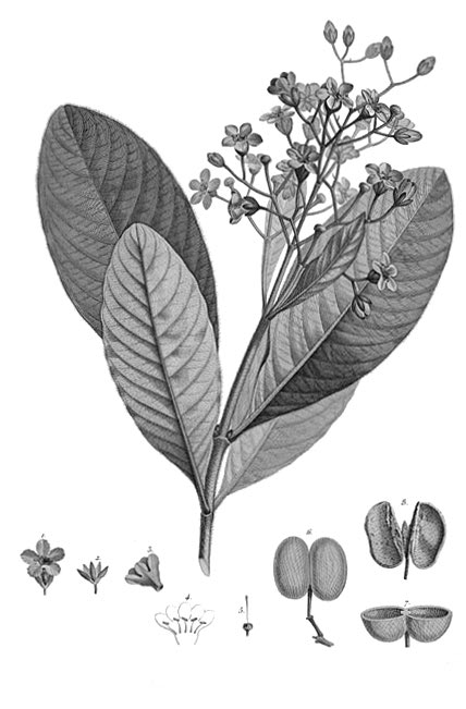 Illustration of Platycarpum orenocense 104 (Platycarpum orinocense Bonpl., ) from Plantes équinoxiales recueillies au Mexique : dans l'île de Cuba, dans les provinces de Caracas, de Cumana et de Barcelone, aux Andes de la Nouvelle Grenade, de Quito et du Pérou, et sur les bords du rio-Negro de Orénoque et de la rivière des Amazones. / Voyage de Humboldt et Bonpland